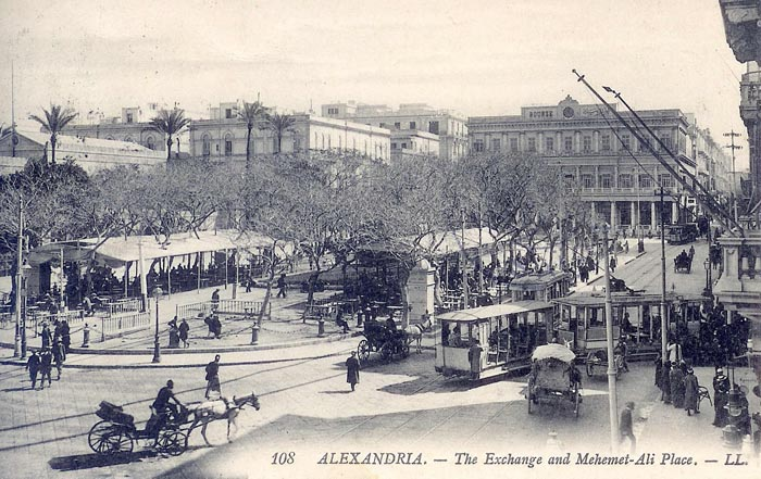 s.o.